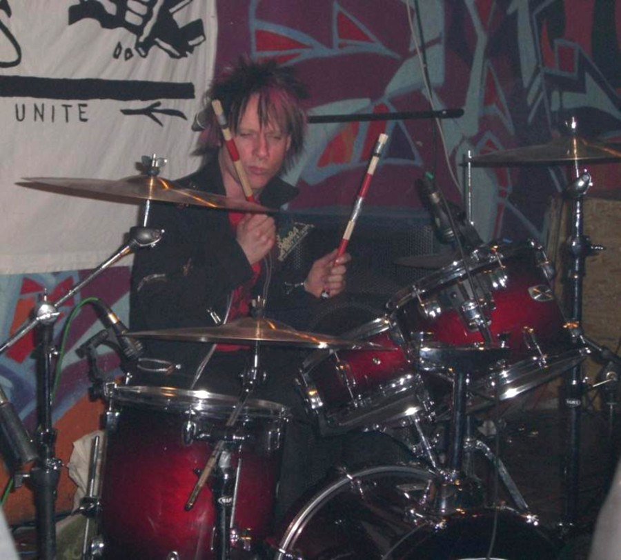 Vom Ritchie in Schwäbisch Gmünd am 10. Januar 2009